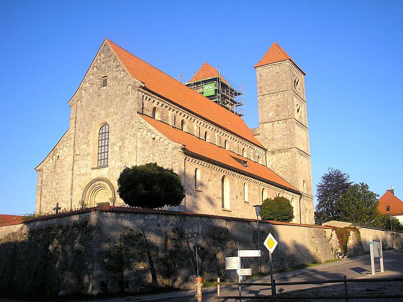 St. Michael (Altenstadt bei Schongau, Obb.). Gesamtansicht von Südwesten. Eigene Aufnahme, Sept. 2006 / St. Michael (Altenstadt near Schongau, Upper Bavaria, Germany). Total view from southwest. Own photo, Sept. 2006